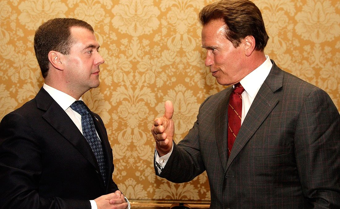 Medvedev and Arnold Schwarzenegger